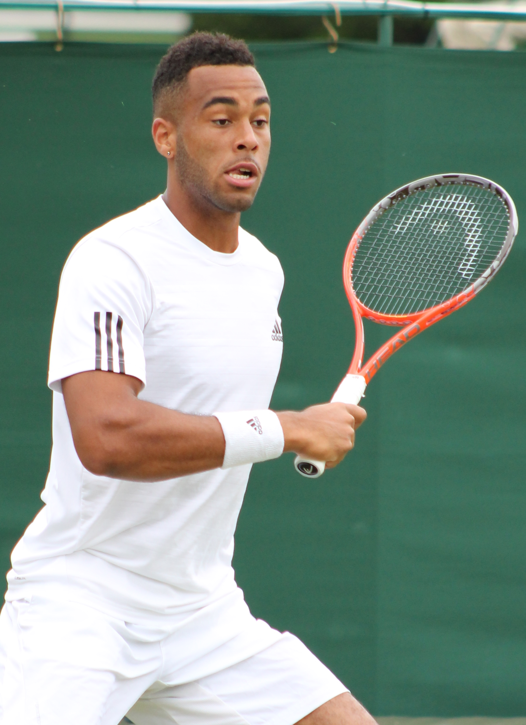 Ward Hibbert WMQ14 (6)